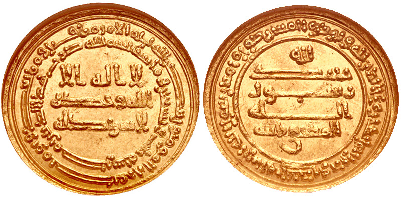 Dinar de ouro emitido em 905-906 pelo califa abássida Almoctafi II